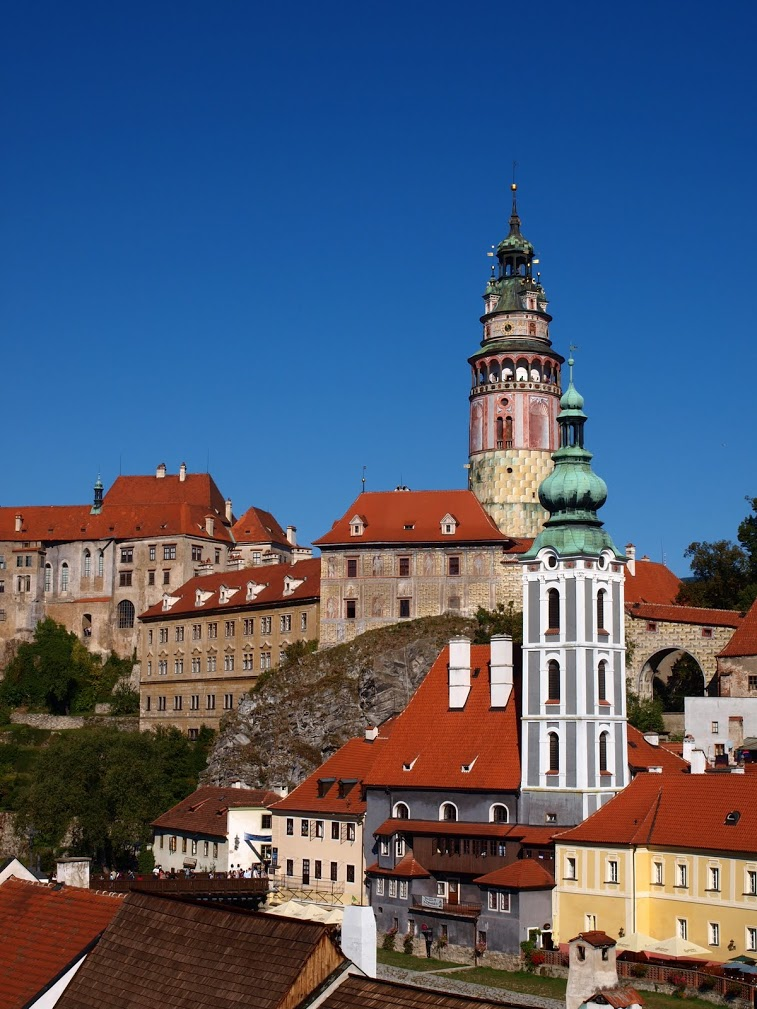 Český Krumlov